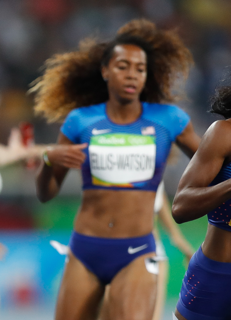 Rio de Janeiro - Eliminatórias do revezamento 4 x 400m nos Jogos Rio 2016, no Estádio Olímpico (Fernando Frazão/Agência Brasil)